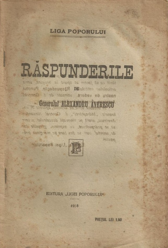 Coperta broșurii "Răspunderile", publicată de către Alexandru Averescu în 1918.